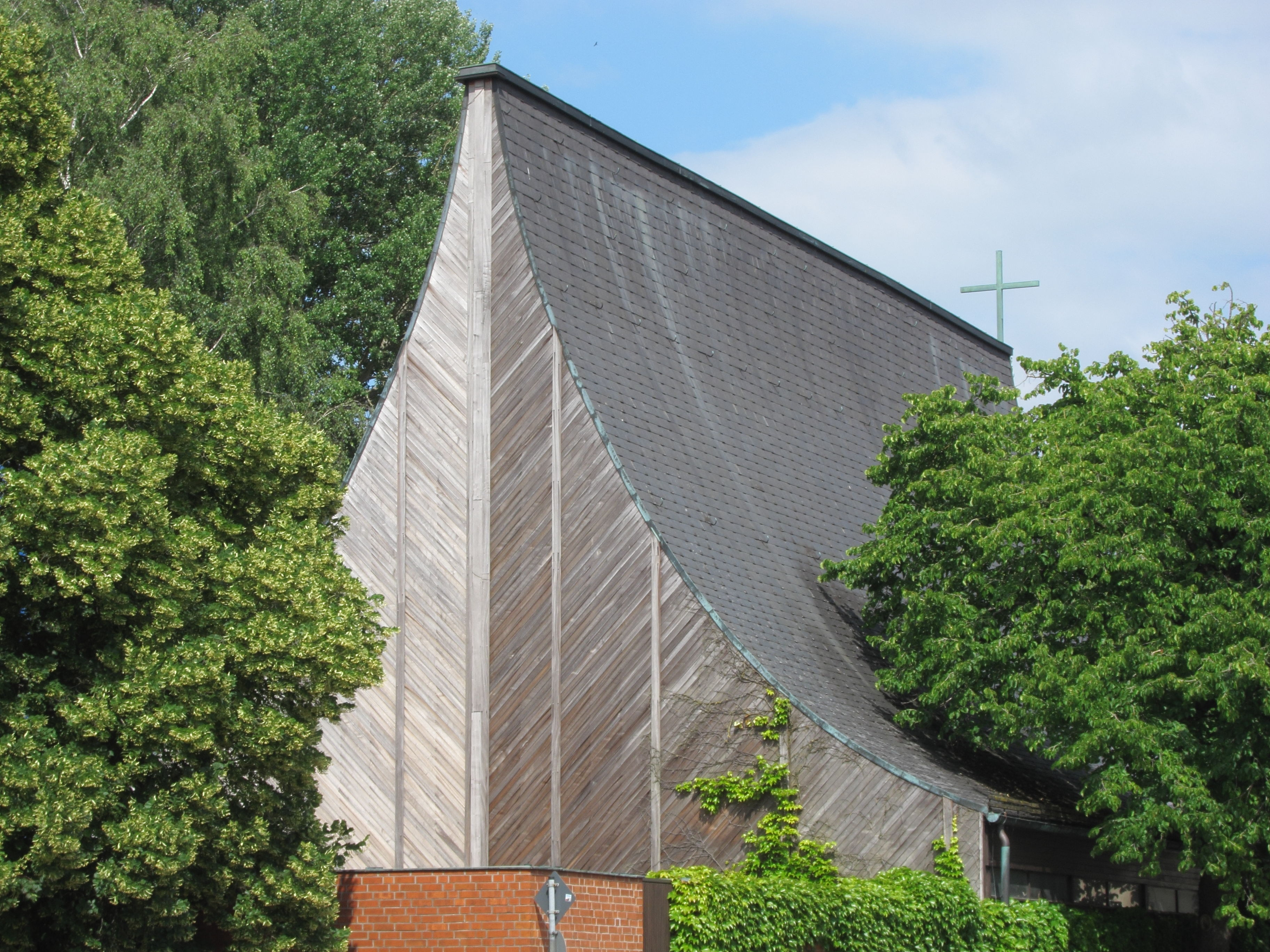 Klettham, Friedrichstr. 11; evang.-Luth. Erlöserkirche, von Sichtziegelmauer zusammengefasste längsrechteckige Anlage aus Pfarrkirche und Gemeindezentrum mit Innenhof und Vorhof, 1962/63 von Hans Busso von Busse unter Mitarbeit von Roland Büch; Pfarrkirche als dreischiffiger Raum mit nach oben spitzbogig zusammenlaufender Holzbinderkonstruktion und geschwungenem Satteldach; Vorhof mit Glockenturm in Stahlkonstruktion; mit Ausstattung.